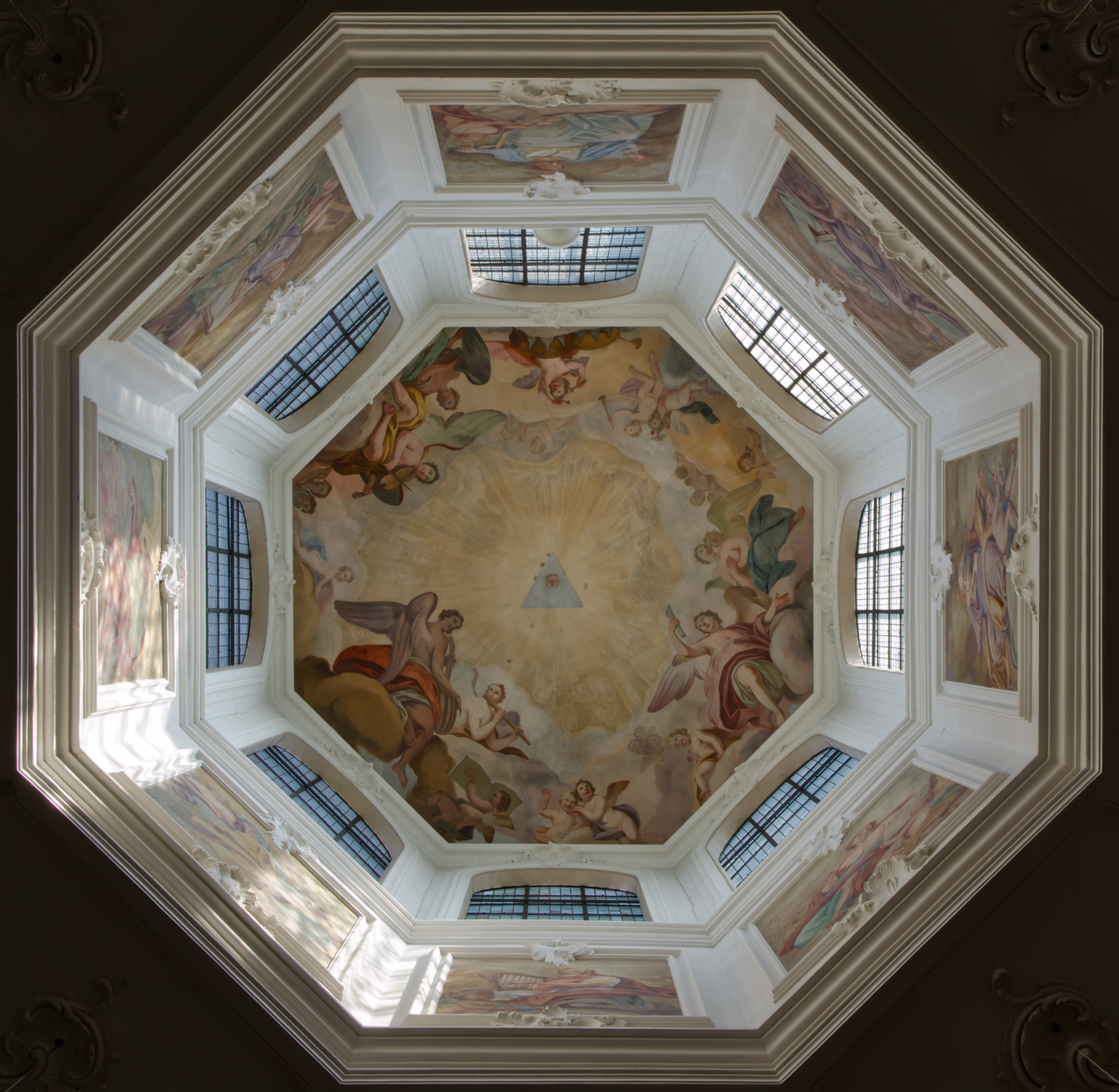 Rellinger Kirche - Blick in die Laterne